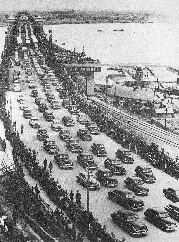 1957年10月15日，武汉长江大桥建成通车。